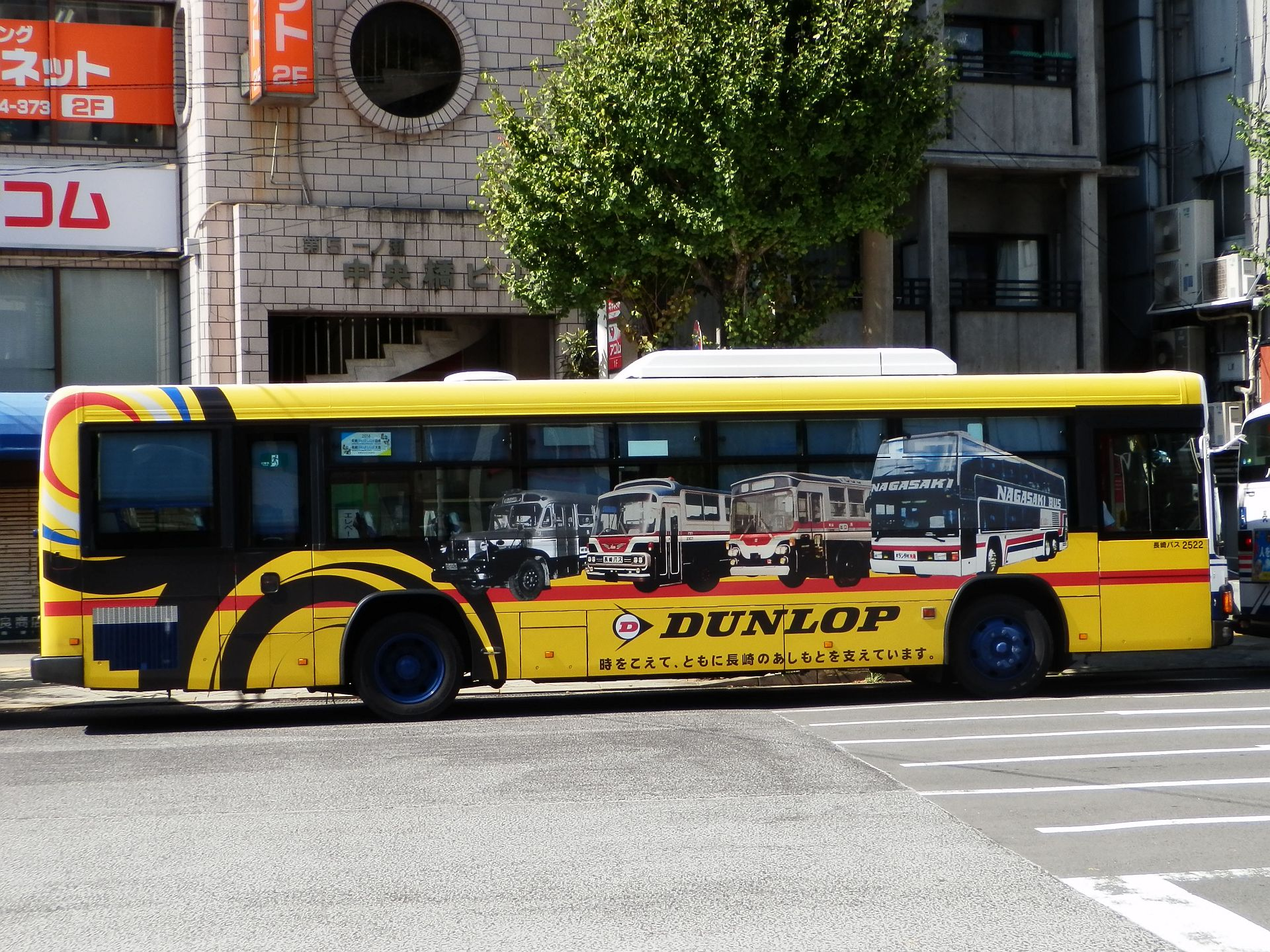 ダンロップタイヤのラッピング広告を掲載している長崎バスの車両